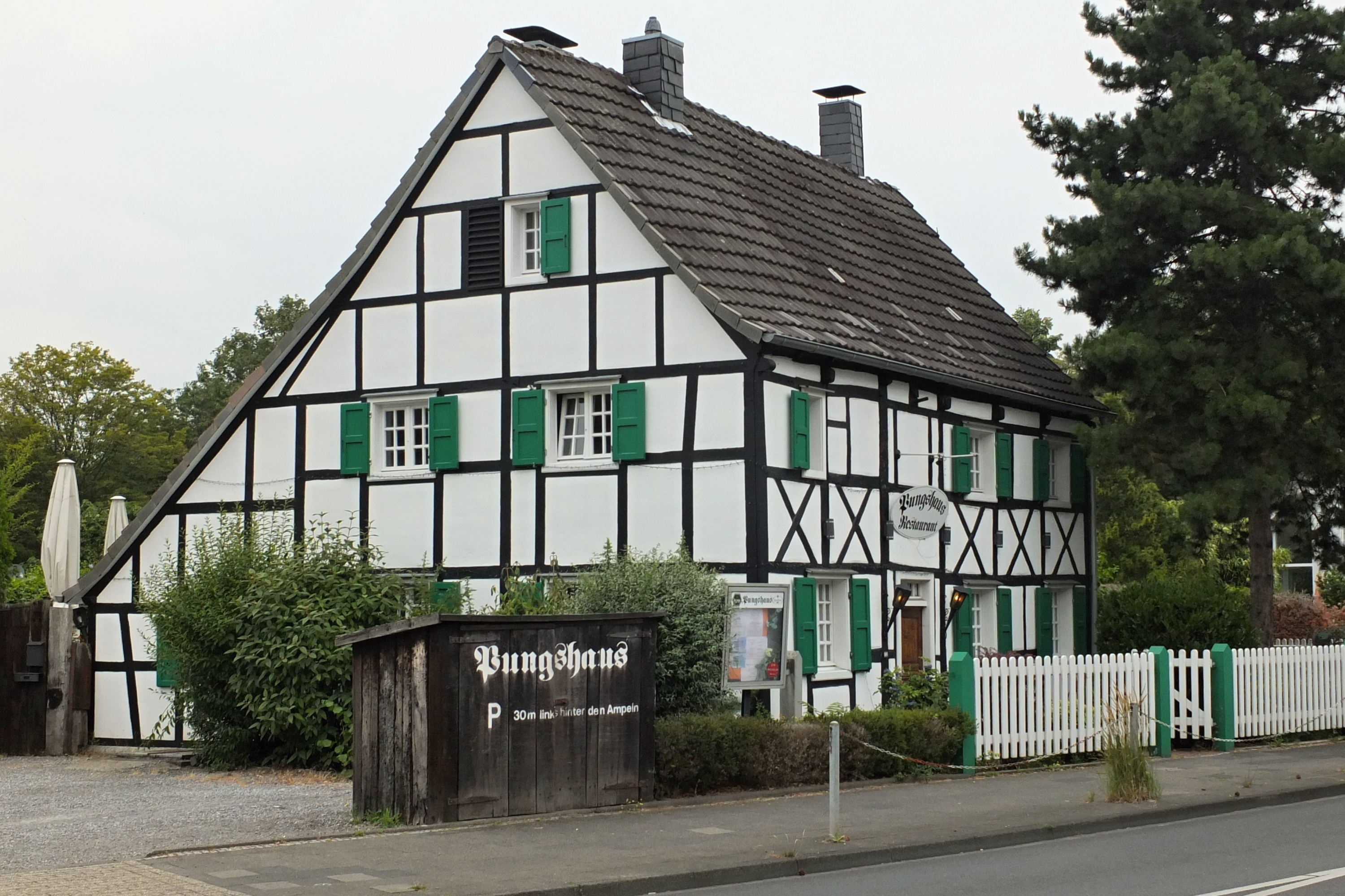 Fachwerkhaus Pungshaus, Hilden, Grünstr. 22, Ansicht von SüdostenThis is a photograph of an architectural monument.